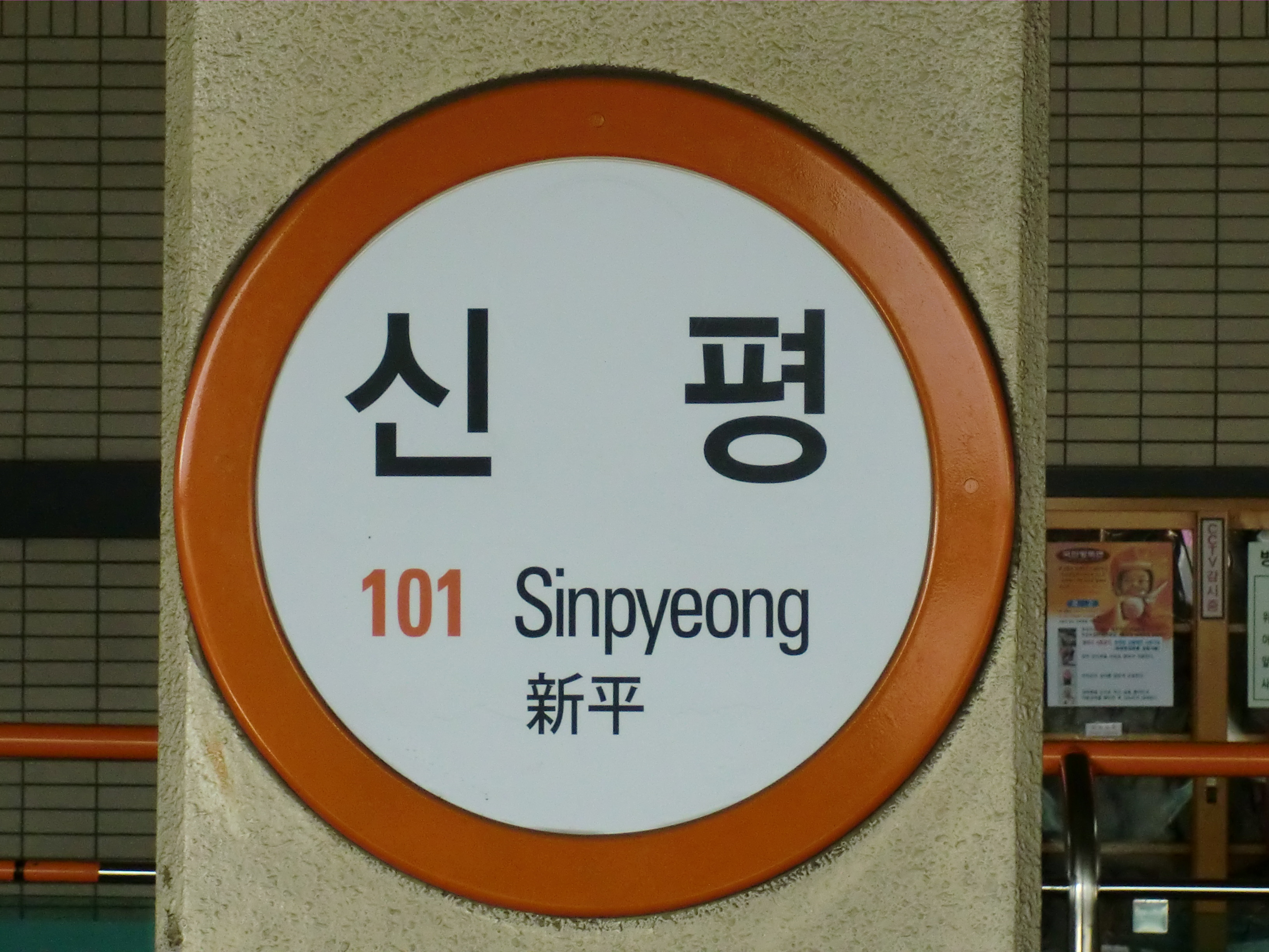 부산도시철도 1호선 신평역의 역명판